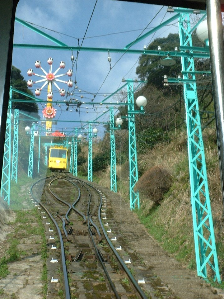 別府ラクテンチケーブル線 交換地点付近